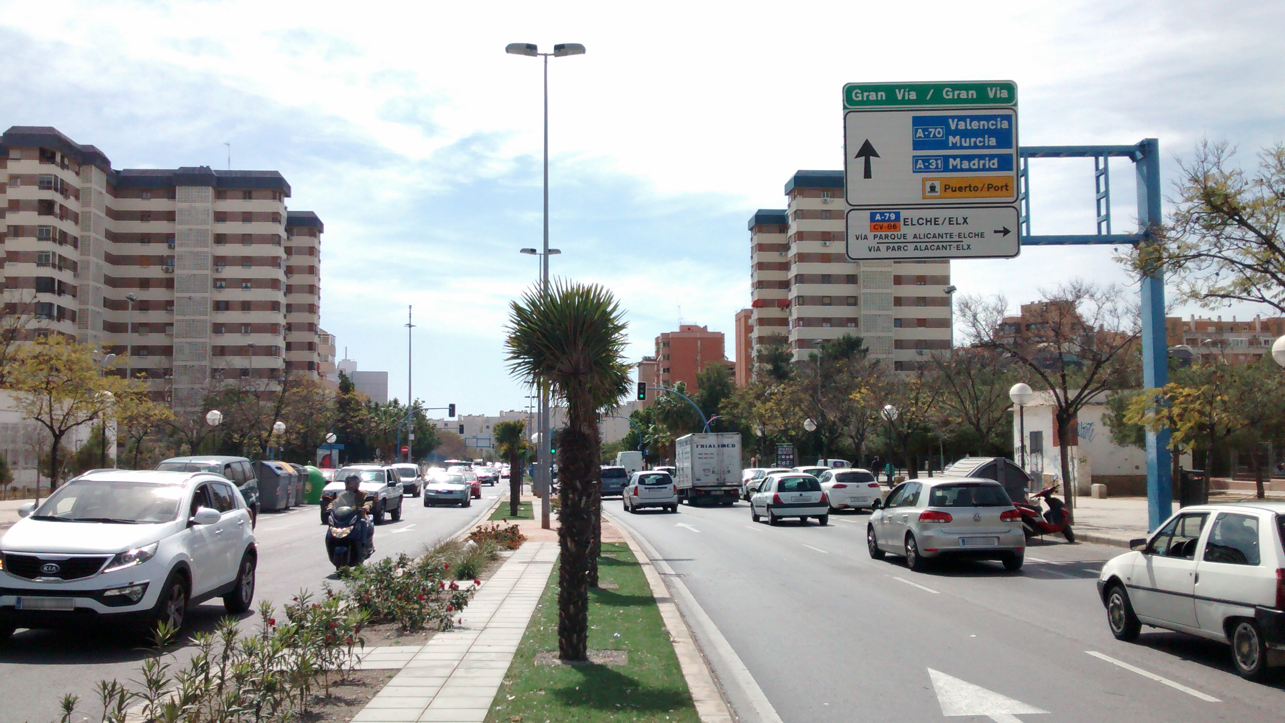 Tramo de la Gran Vía de Alicante (España) en un punto intermedio entre la Rotonda del Barco y el Puente Rojo.